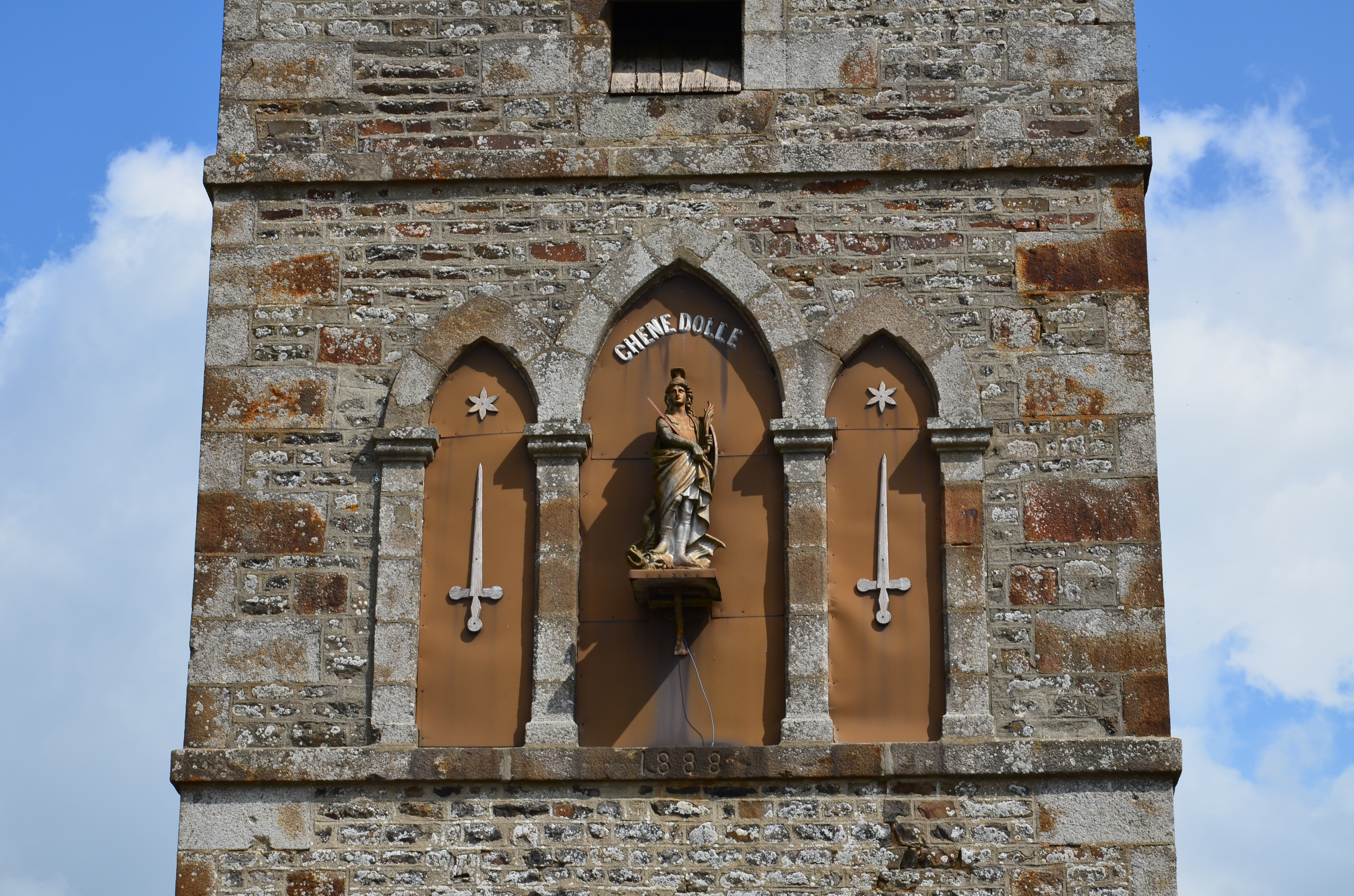 Haut-relief représentant Saint Georges terrassant un dragon, sur le fronton de l'église Saint-Georges de Chênedollé.